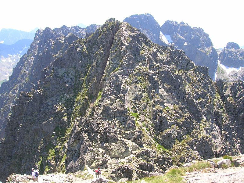 Orla Perć.